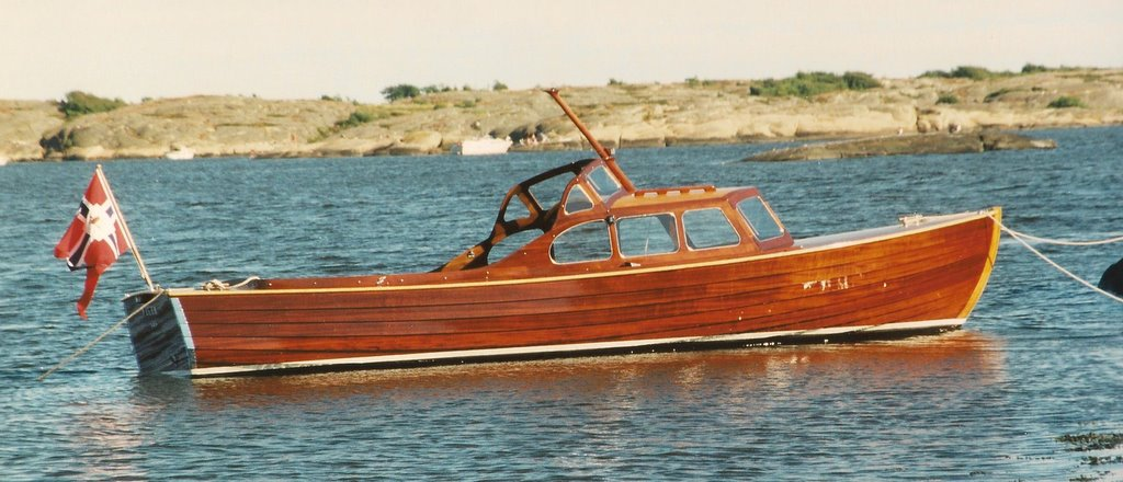 Aas-terne, Mahogny, byggenr 585, 1966, Bj.Aas Fredrikstad